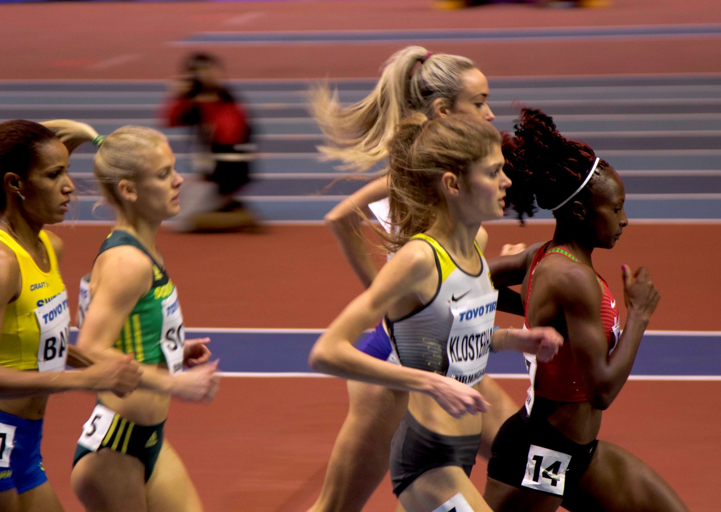 WK010074 3000m dames